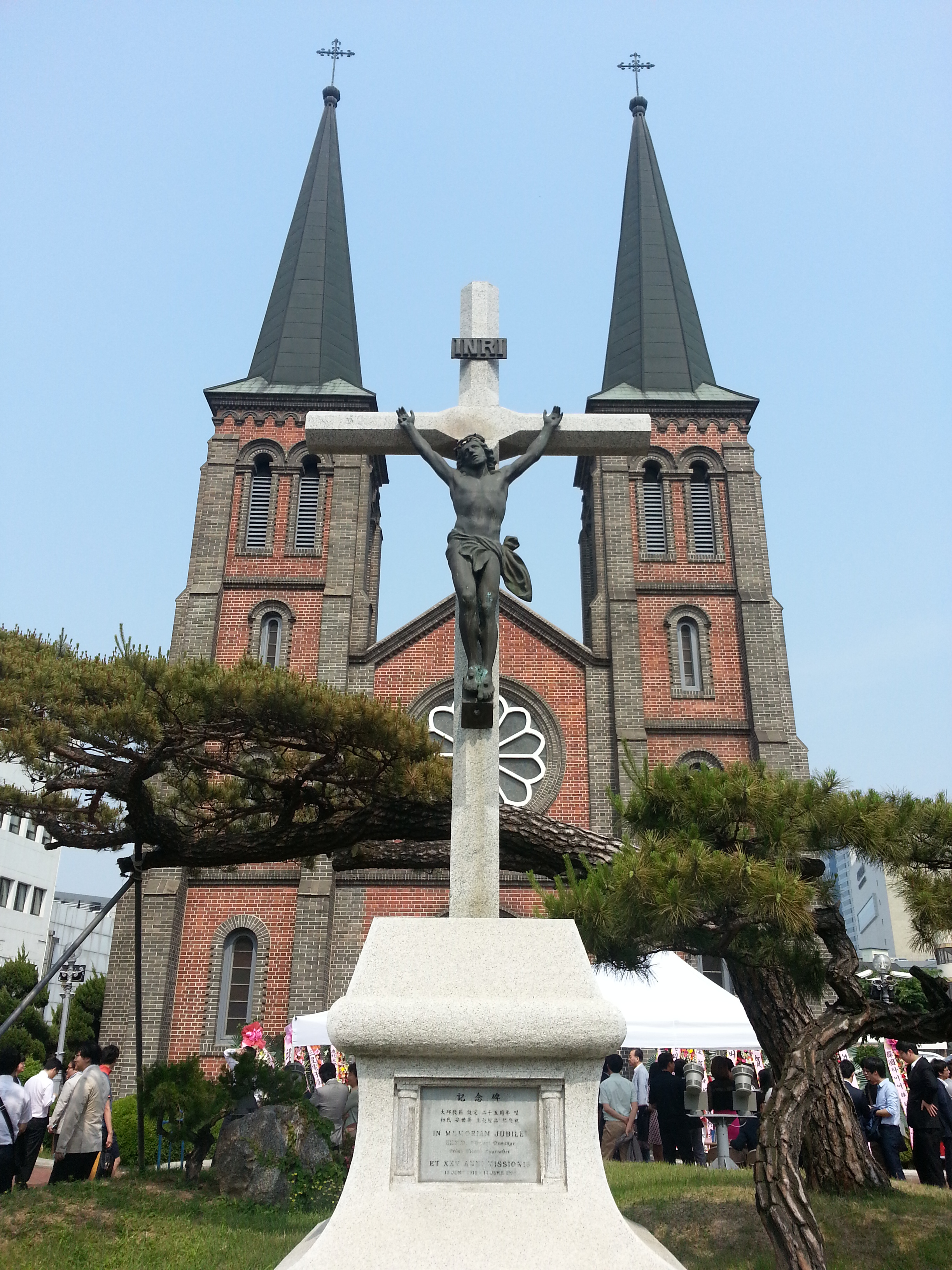 桂山聖堂正面。